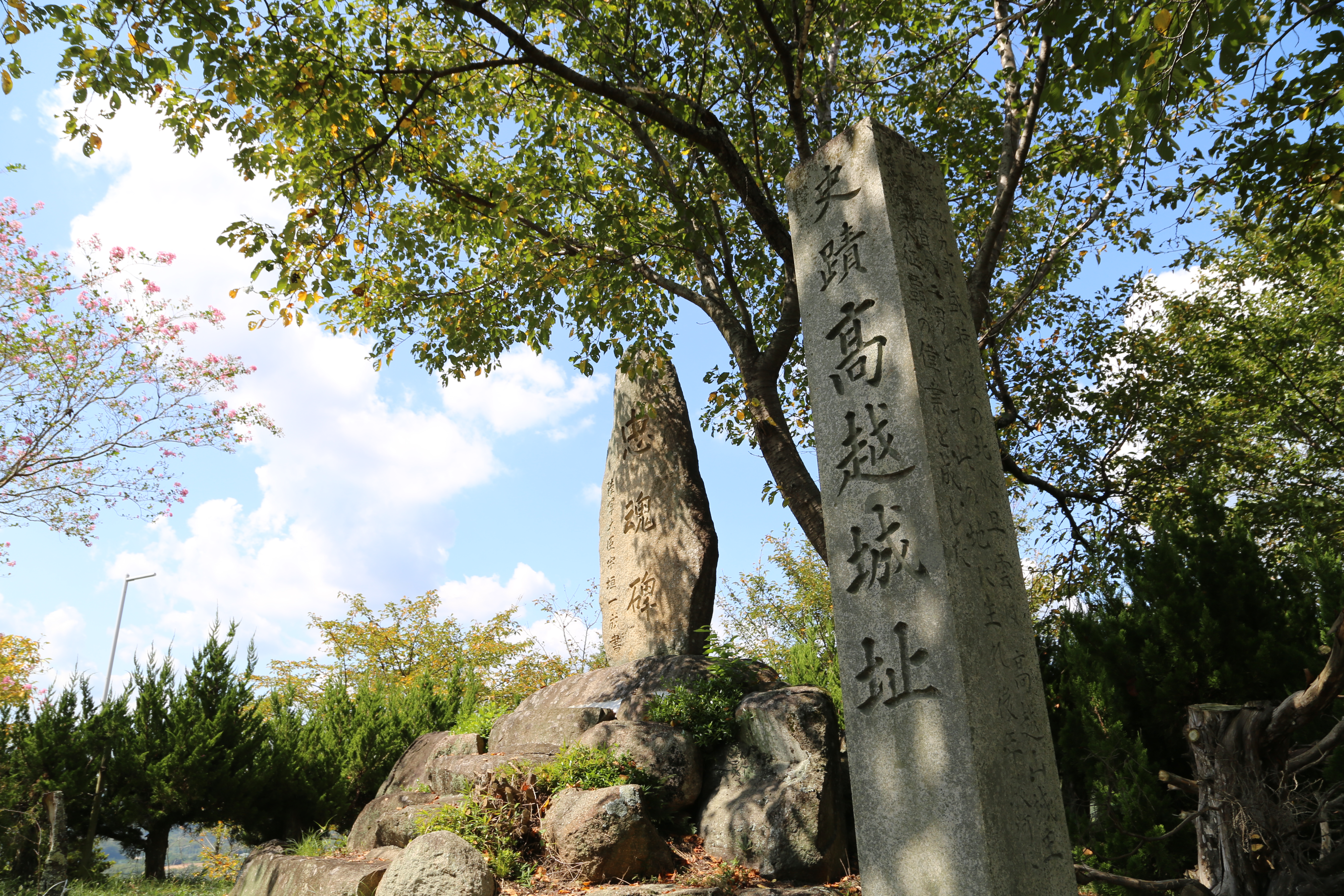 岡山県井原市高越山城跡にある石碑。